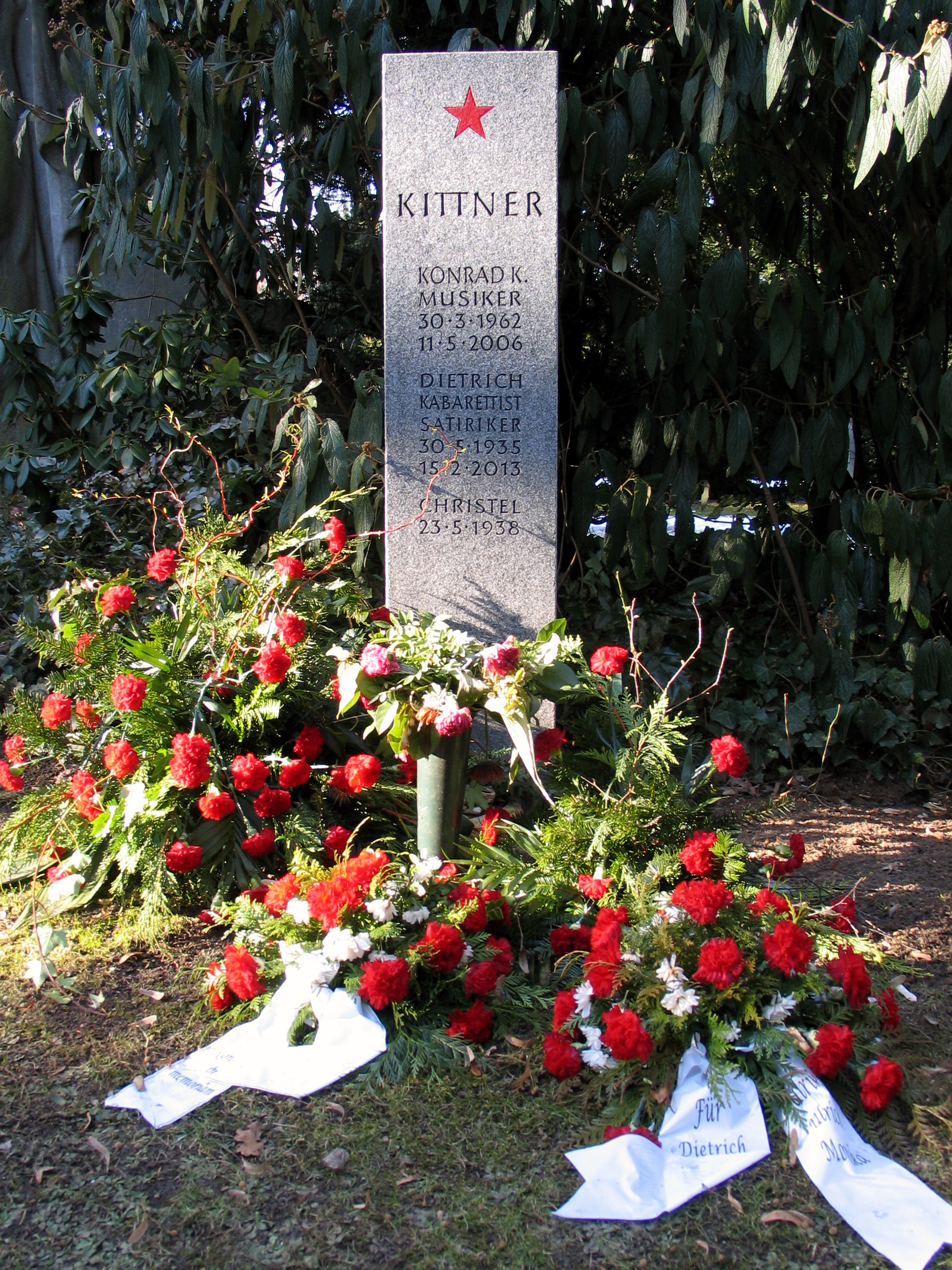 Grabstein der Künstlerfamilie Kittner: Unterhalb eines Roten Sterns und des Familiennamens finden sich die Inschriften für den Satiriker und Kabarettisten Dietrich Kittner (Mitte) und dessen Ehefrau Christel (23. Mai 1938 - 5. März 2014; unten, hier noch ohne Todesdatum) sowie für deren Sohn, den Musiker Konrad K. Kittner (30. März 1962 - 11. Mai 2006; oben). Der Grabstein steht in der Abteilung 25 (gegenüber der Löwenbastion vom Maschsee) des Stadtfriedhofs Engesohde ...